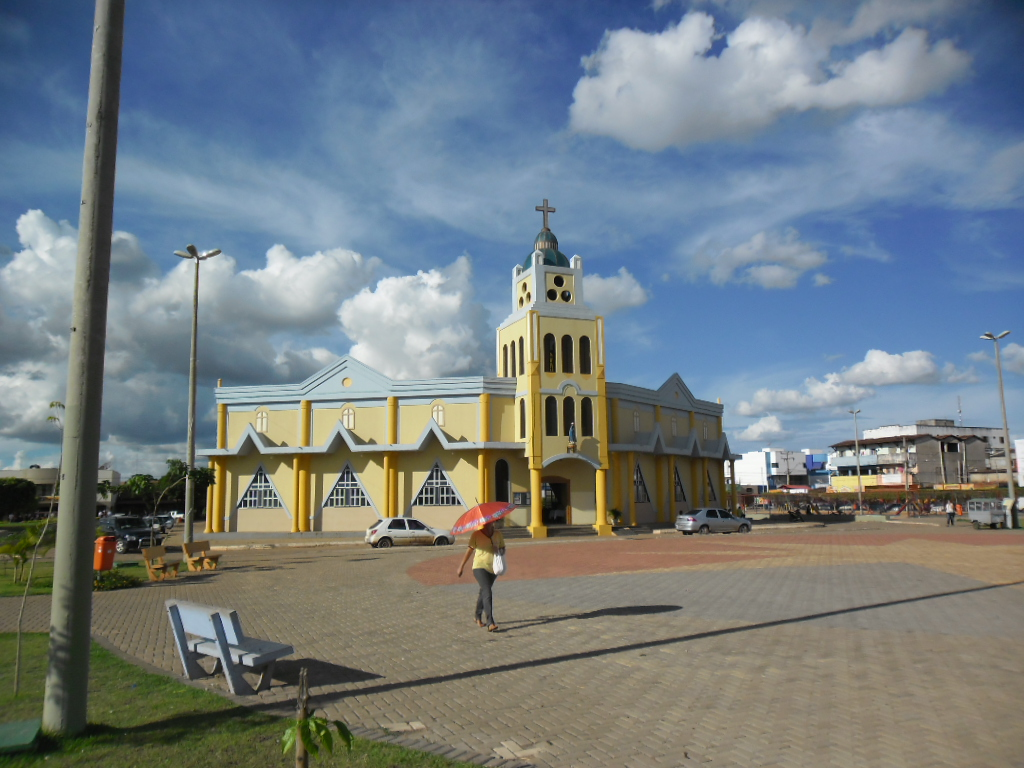 luis eduardo magalhaes - bahia